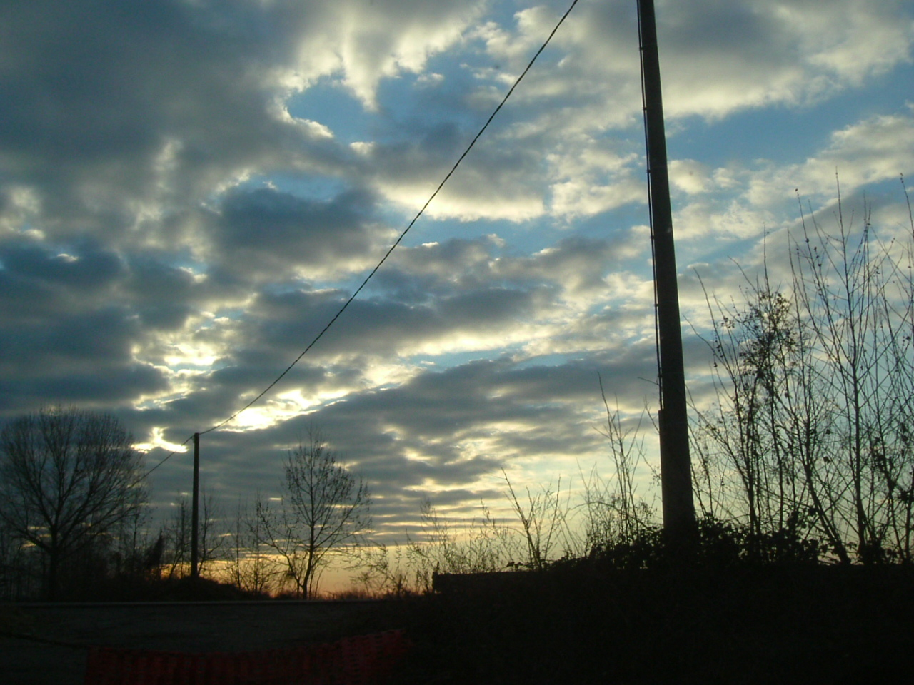 Foto di Manerbio (BS) Scattata da me nel 2003